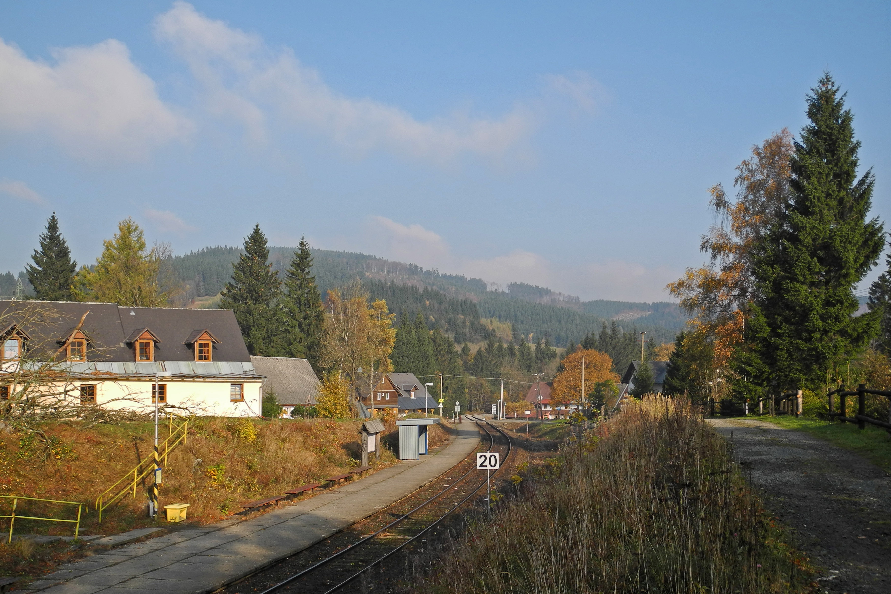 Ramsau (Ramzová) im Altvatergebirge